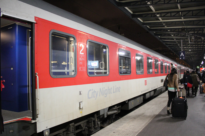 CNL in Paris1